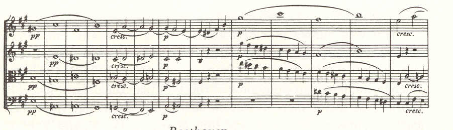 koraalmotief in 4e deel Beethoven opus 18.5